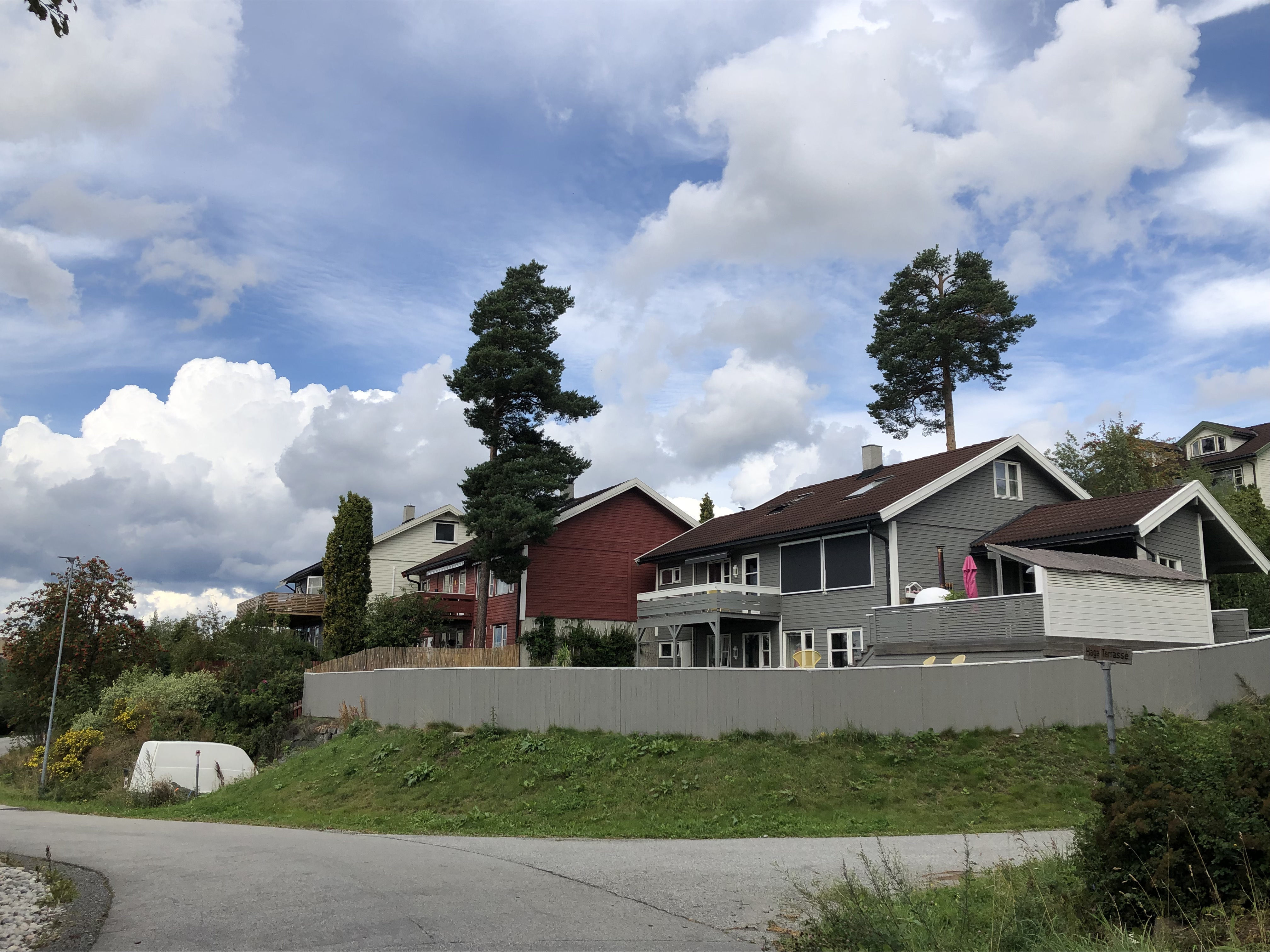 Haga Terrasse 2, 4 og 6 i Haug, Ringerike, sett fra Hagaringen.